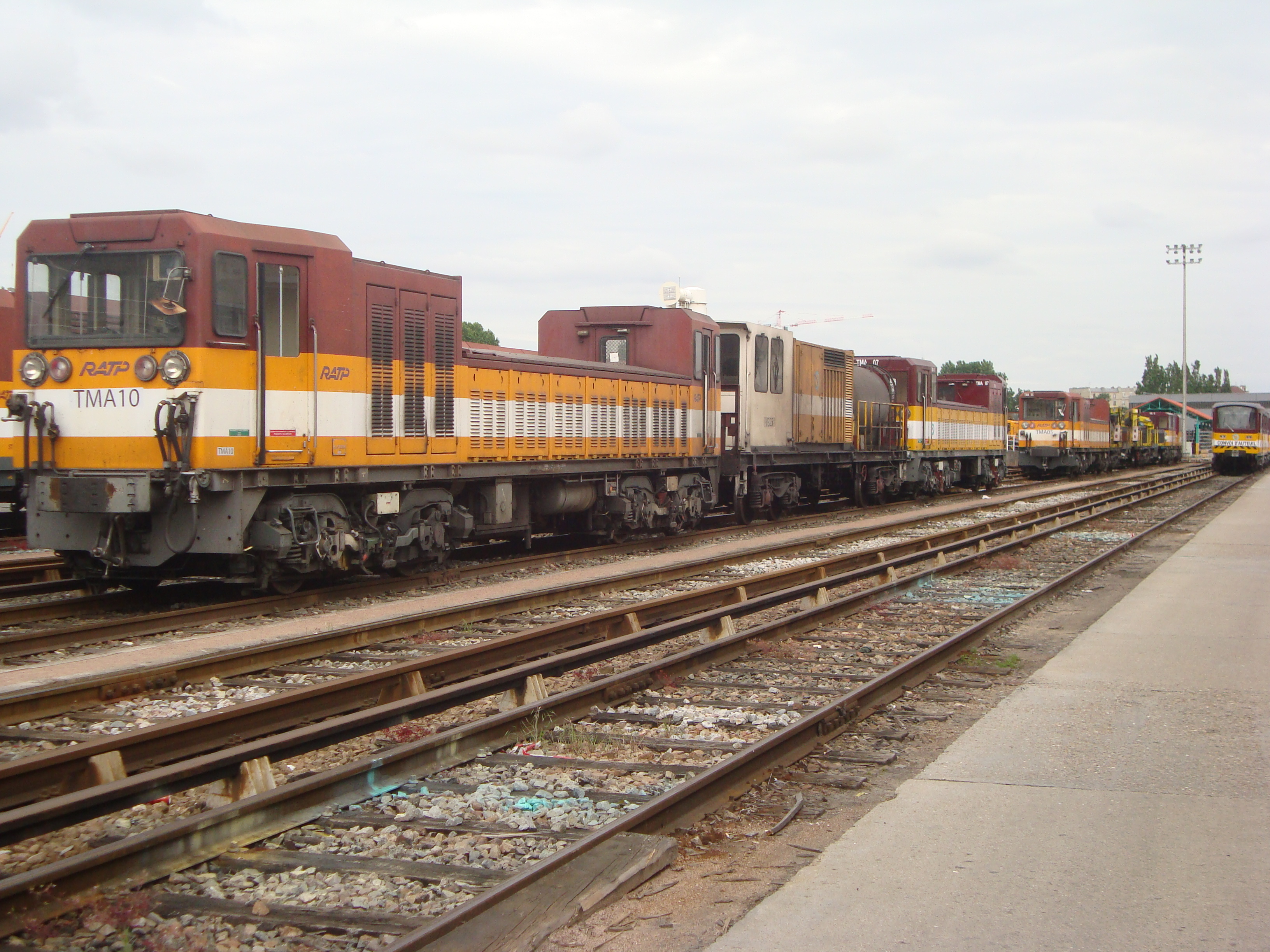 Tracteur à marche autonome TMA10 aux ateliers du métro de Paris à La Villette.